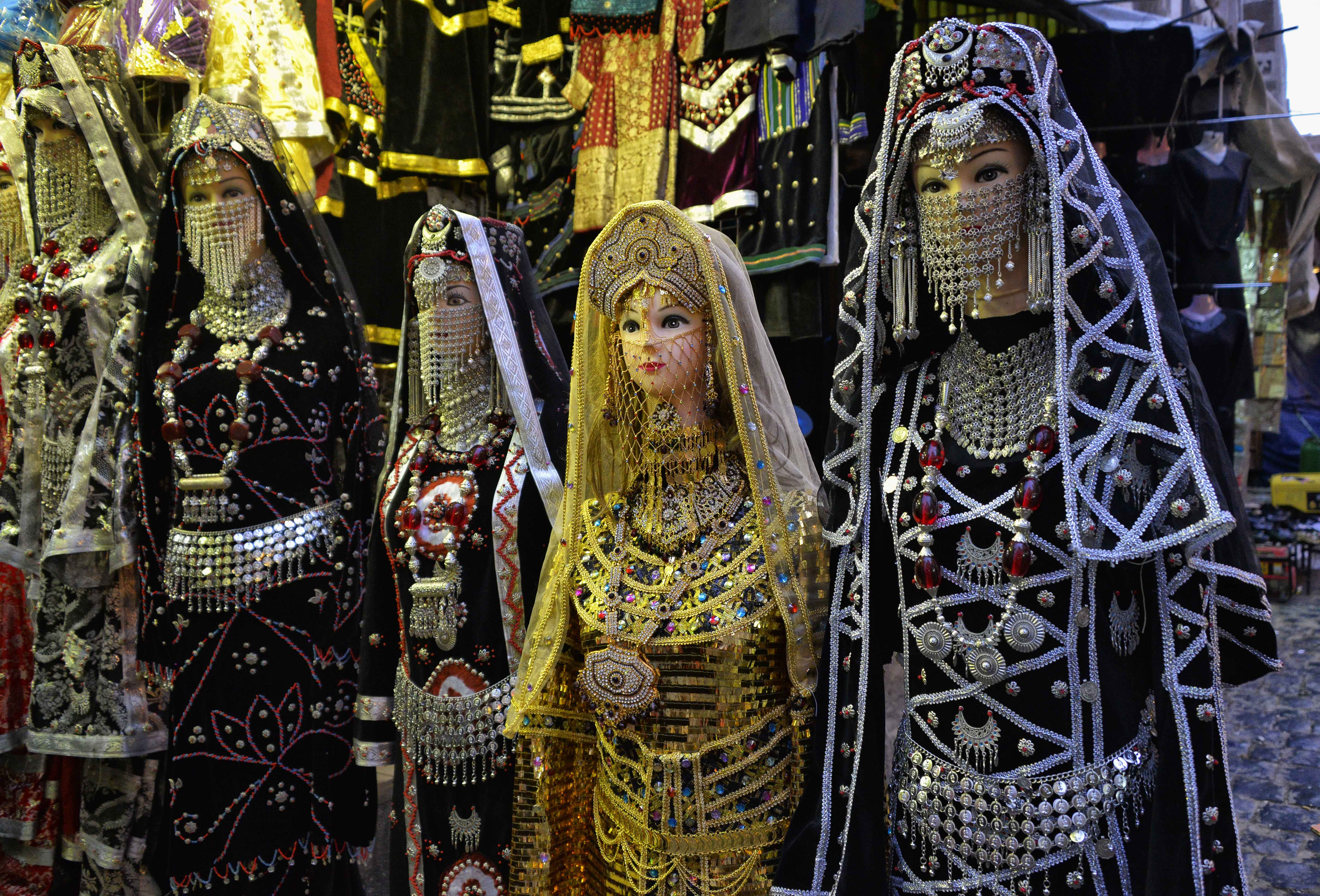 Yemen